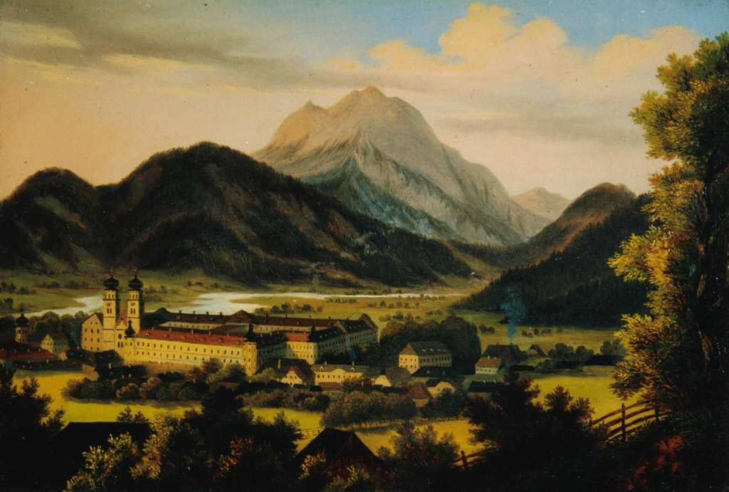 Stift Admont Richtung Ostnordost. Berge: Stockerkogel 1158 m, Gsengkogel 1553 m, Großer Buchstein 2224 m, Himbeerstein 1222 m